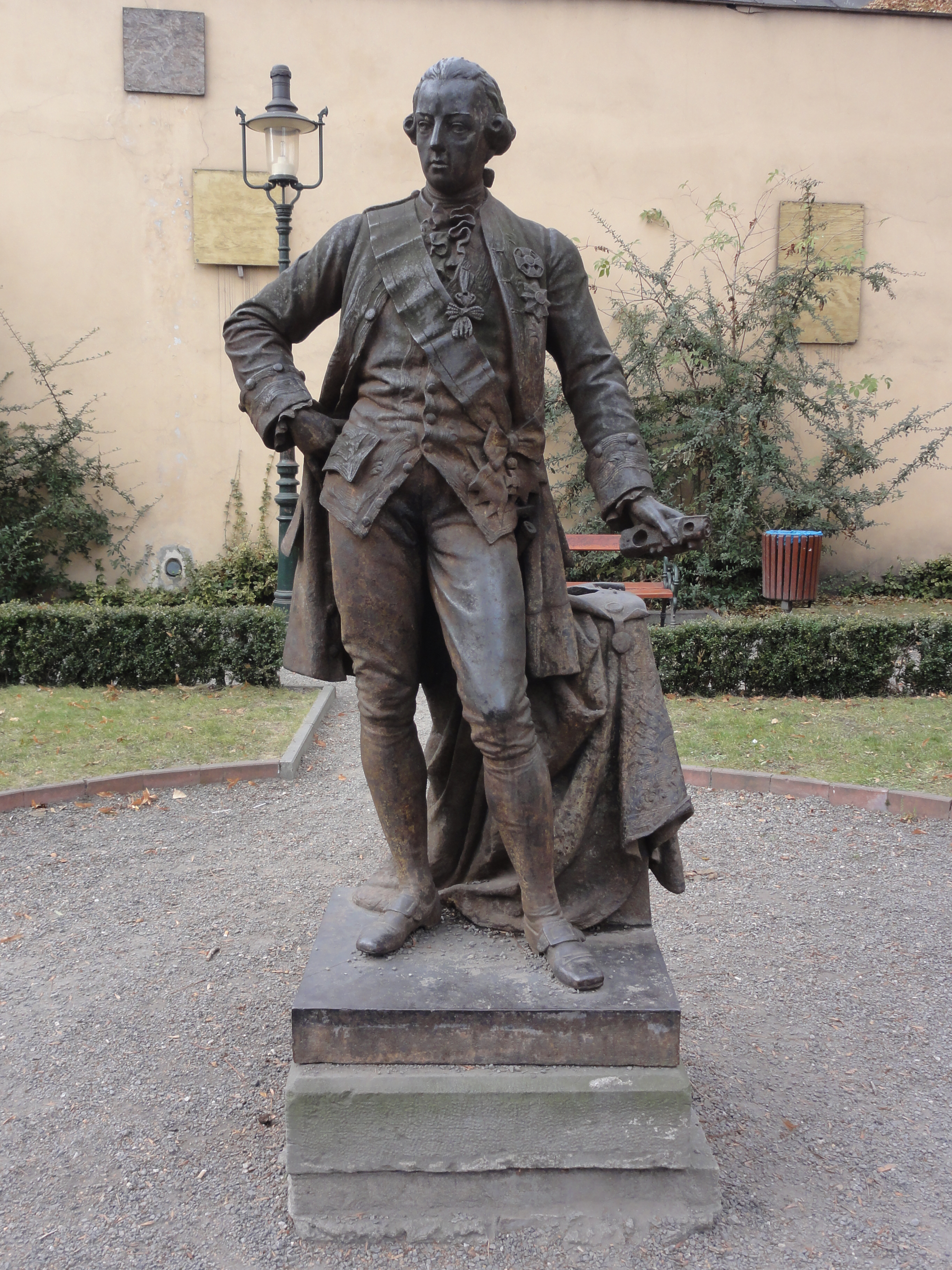 Pomnik cesarza Józefa II w lapidarium w Parku Pokoju w Cieszynie, przeniesiony tu z placu Dominikańskiego.